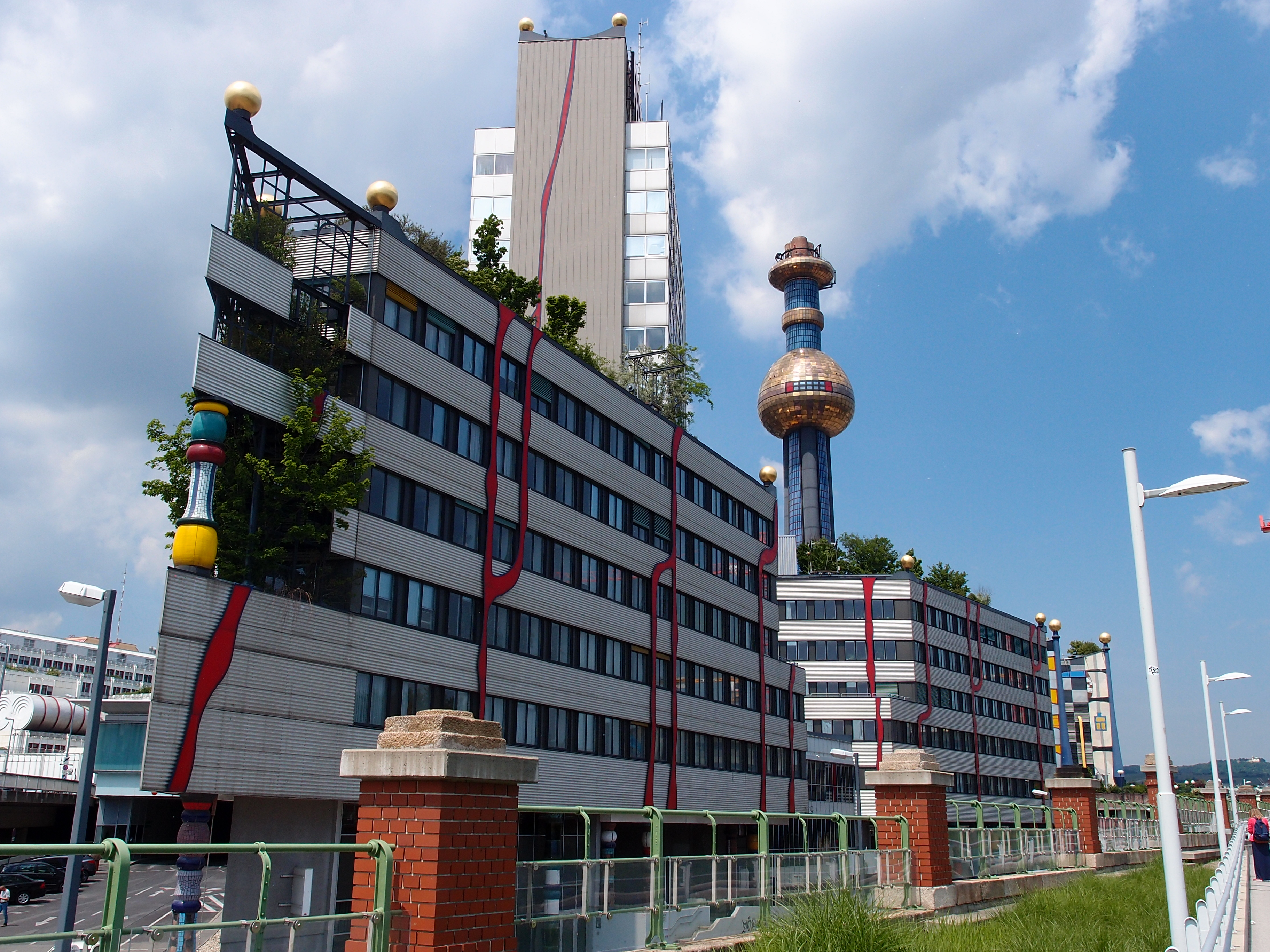 Сміттєспалювальний завод Шпітельау